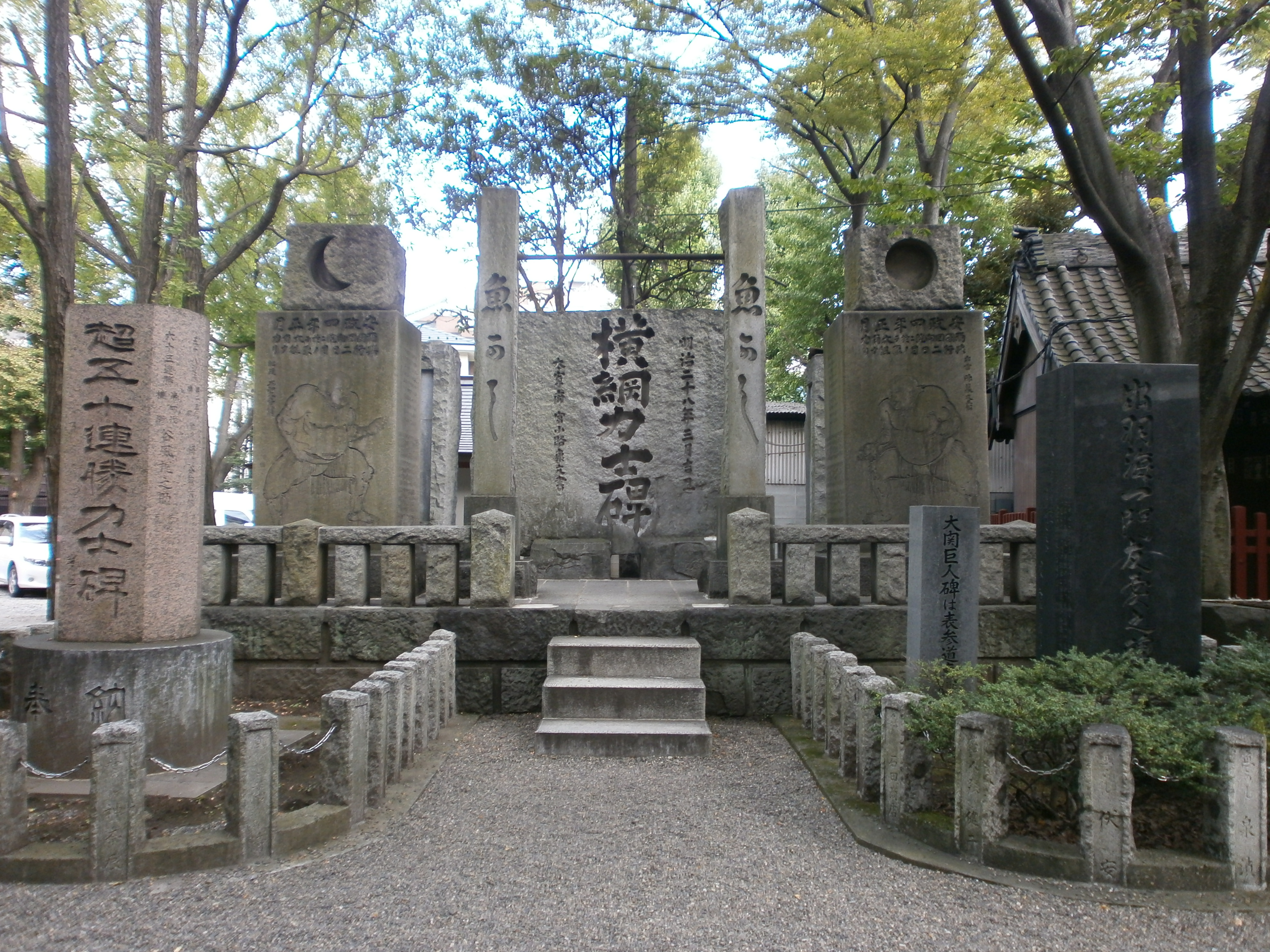 富岡八幡宮の歴代横綱碑